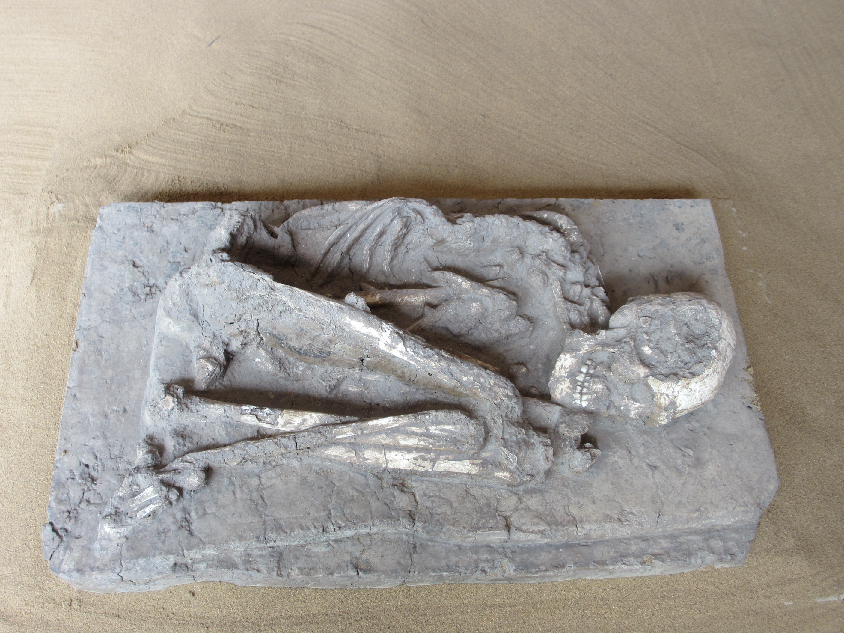 Entierro funerario encontrado en la zona arqueológica de Comalcalco. Tabasco. México. Y actualmente exhibido en el Museo de Sitio de la zona arqueológica.